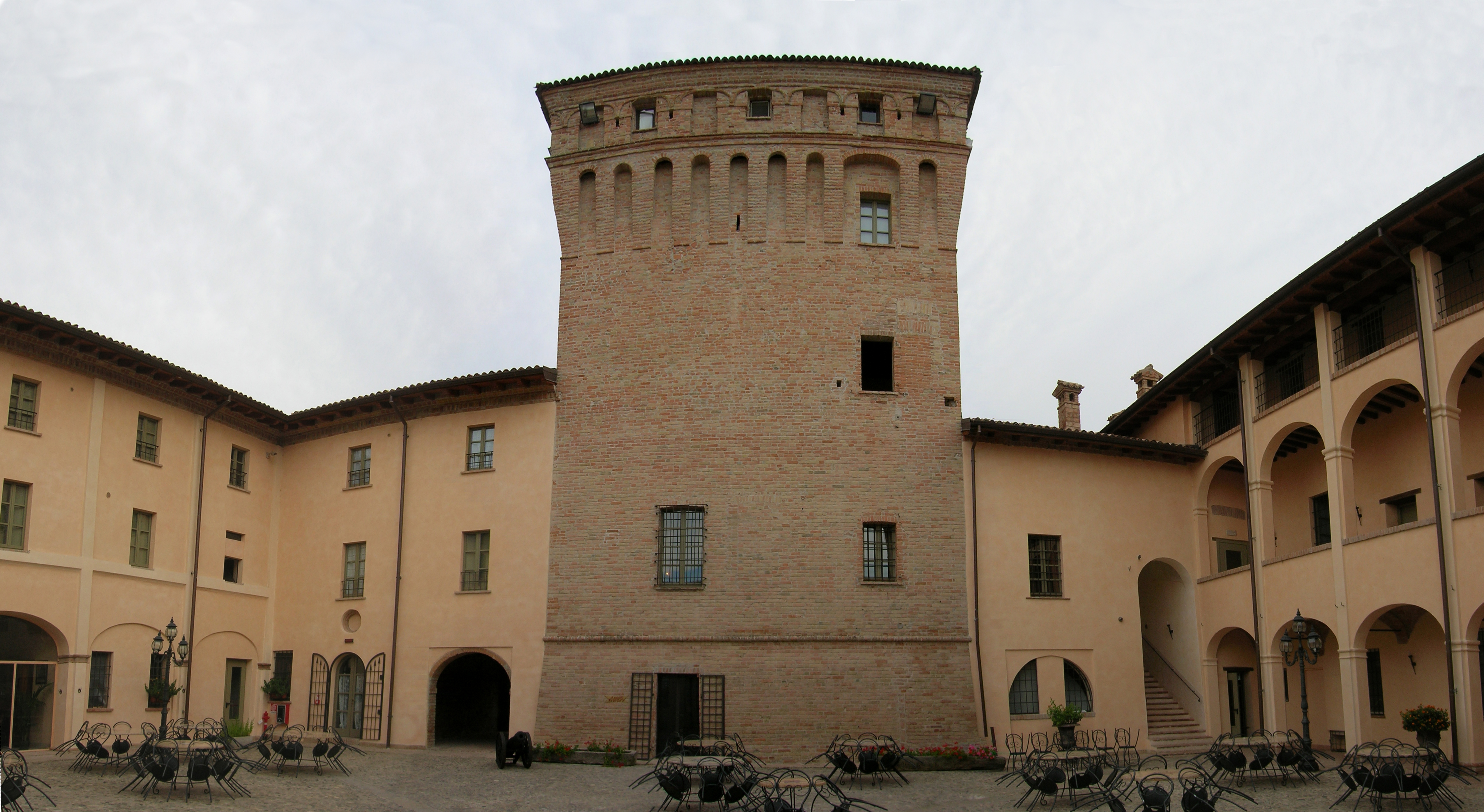 Castello dei Landi, Chiavenna Landi, Cortemaggiore, Italy